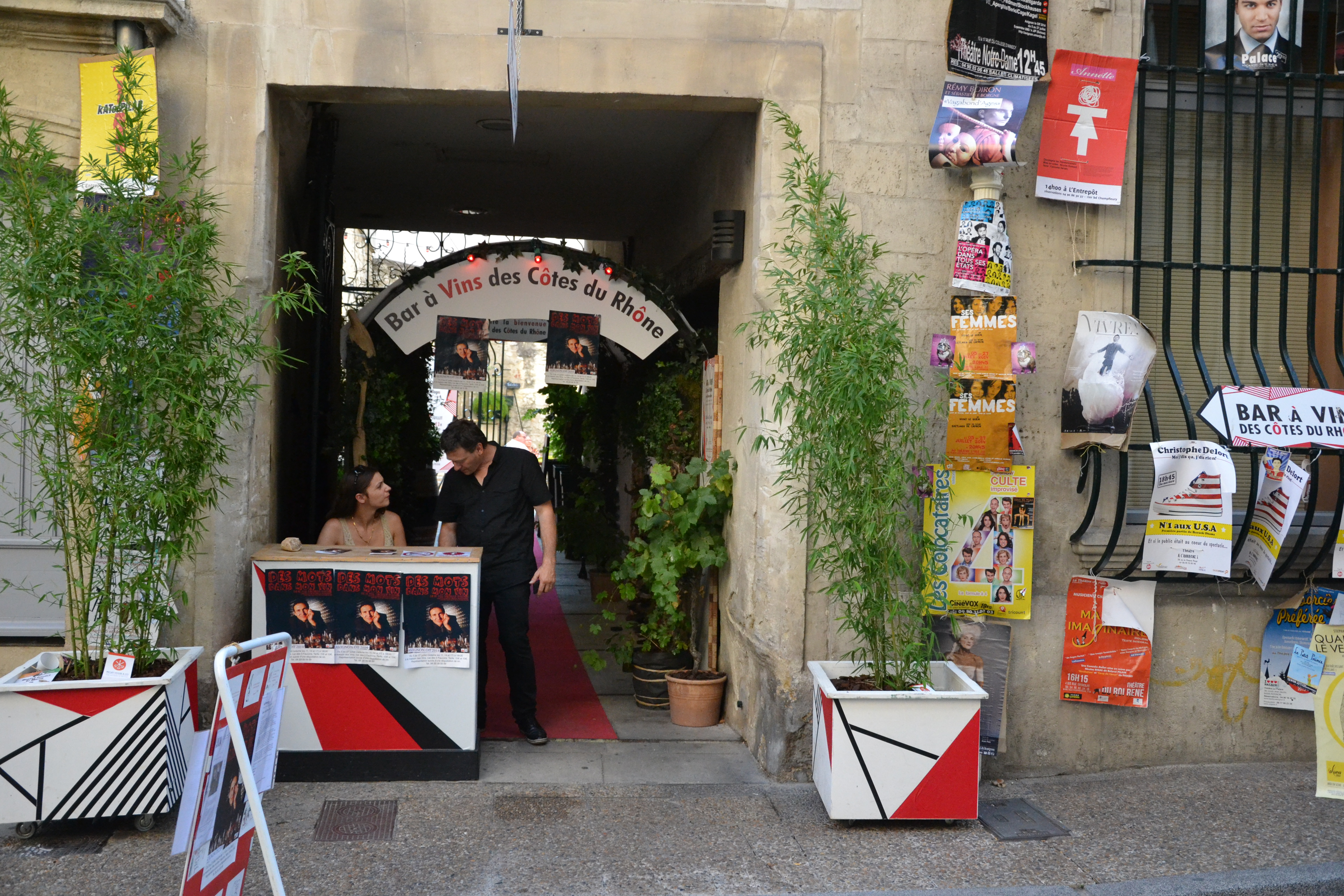 Ambiance festival 2014